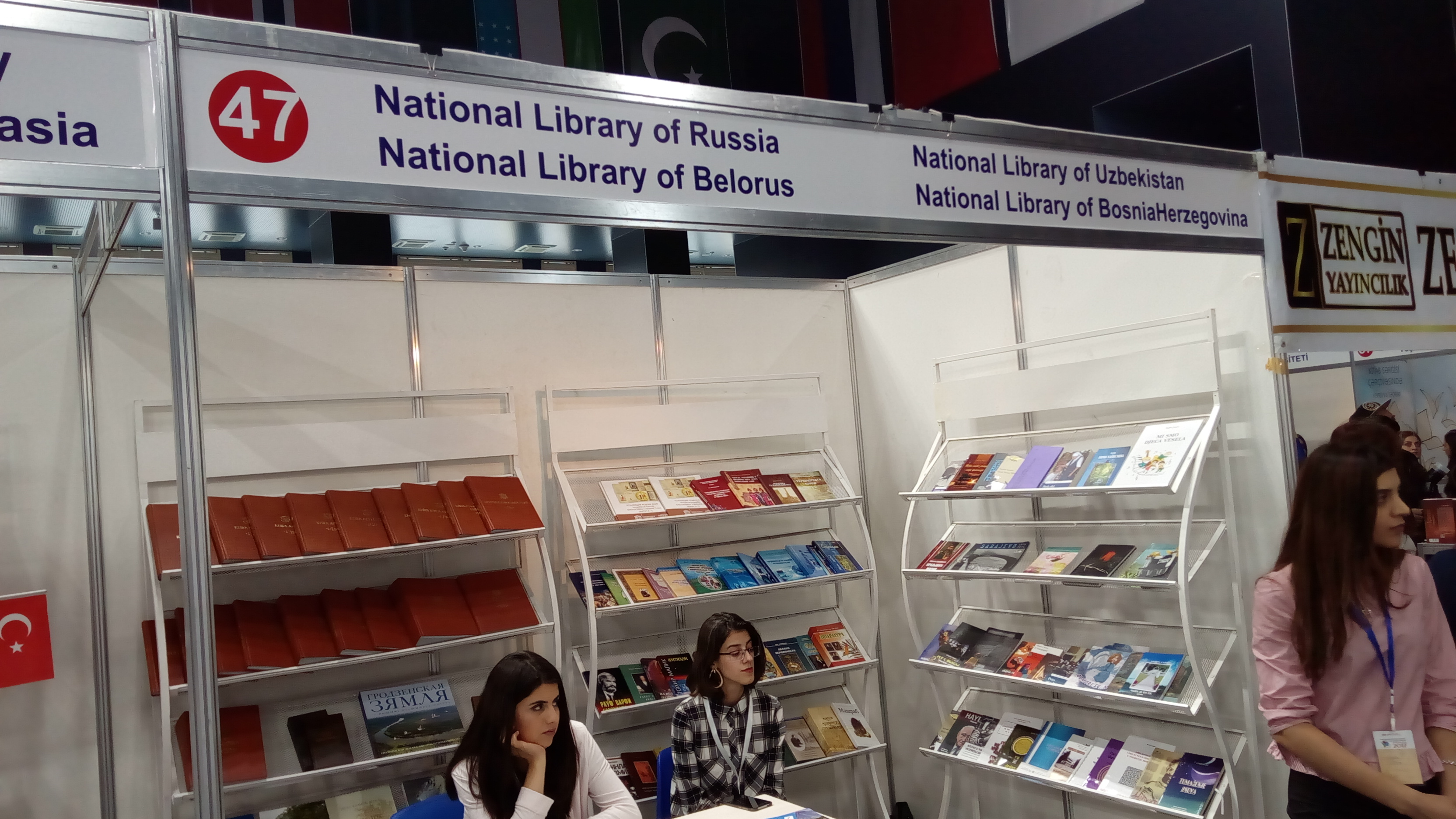 V Bakı Beynəlxalq Kitab Sərgi-Yarmarkası